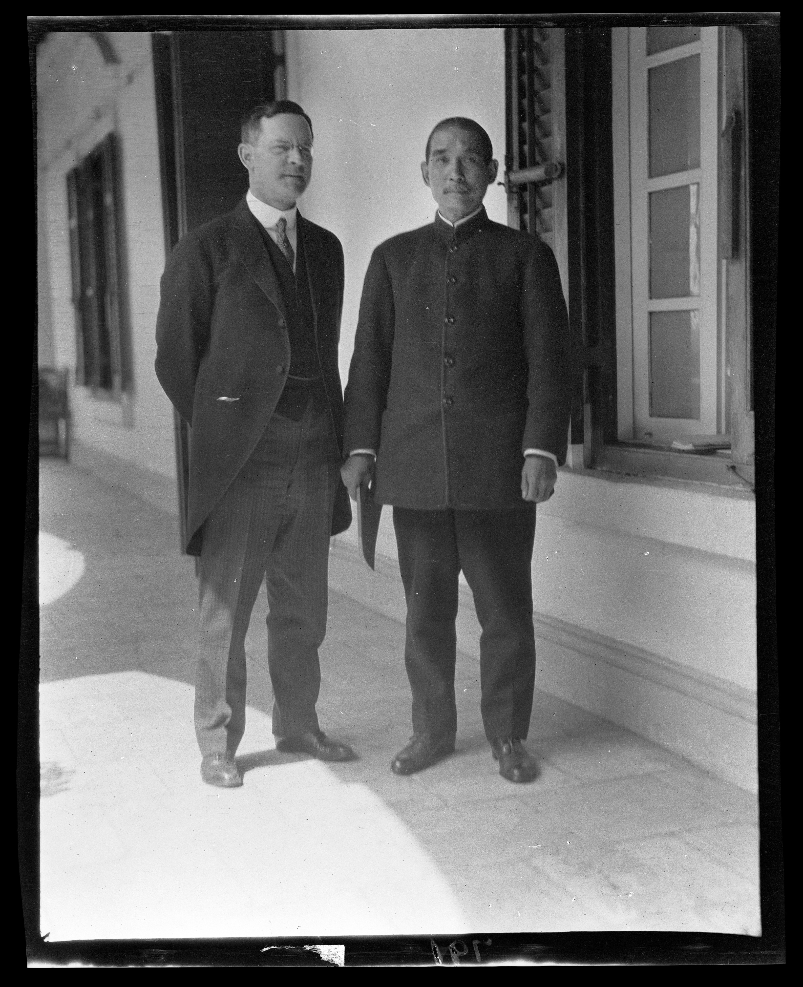 舍伍德·艾迪和孫中山在廣州大元帥府。